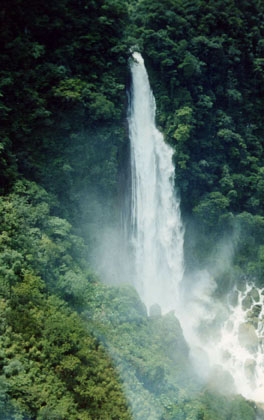 Caída de Agua Atlahuitzia en Zongolica